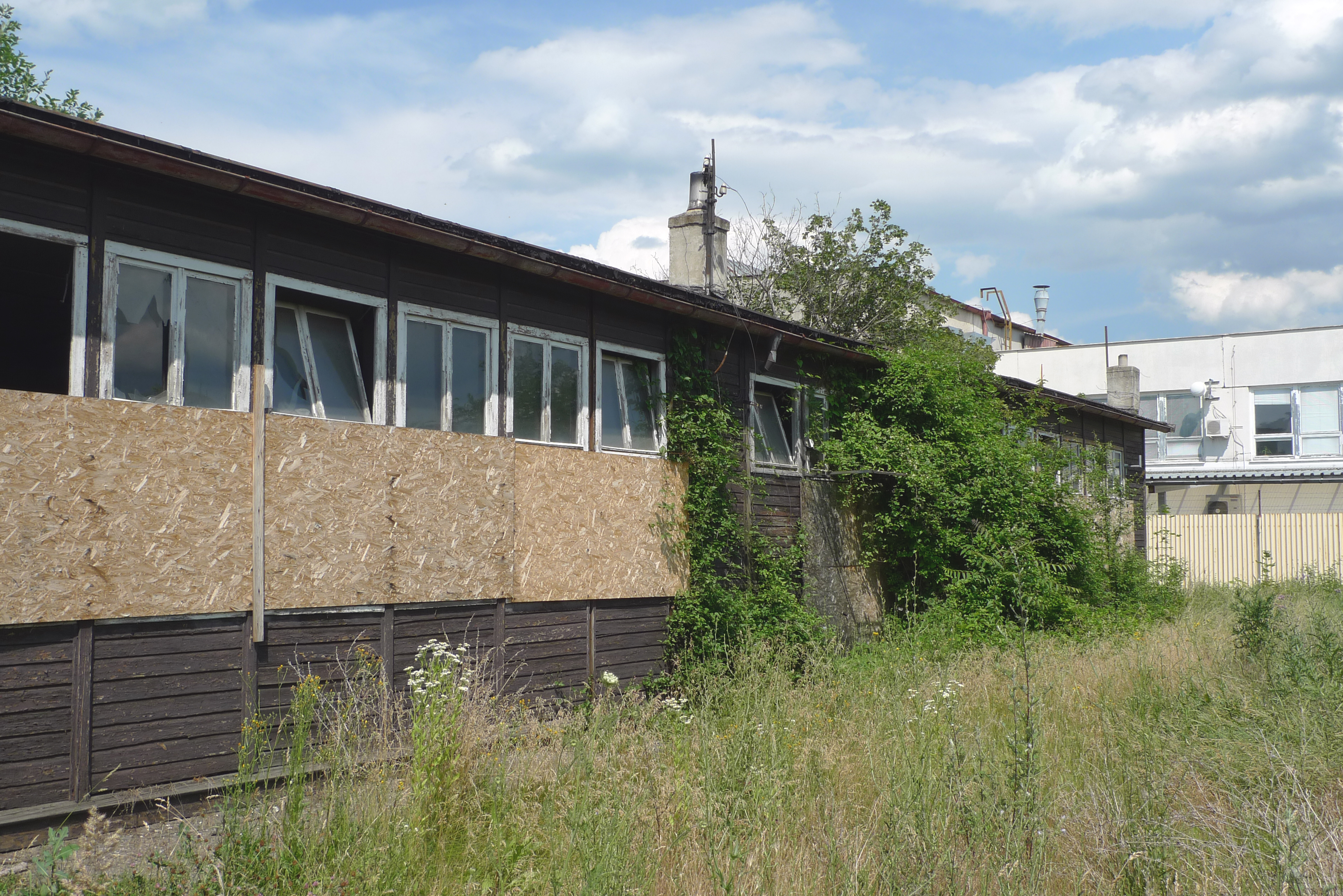 Obecná škola na Bohdalci v Praze 10 ve stavu z léta 2013.